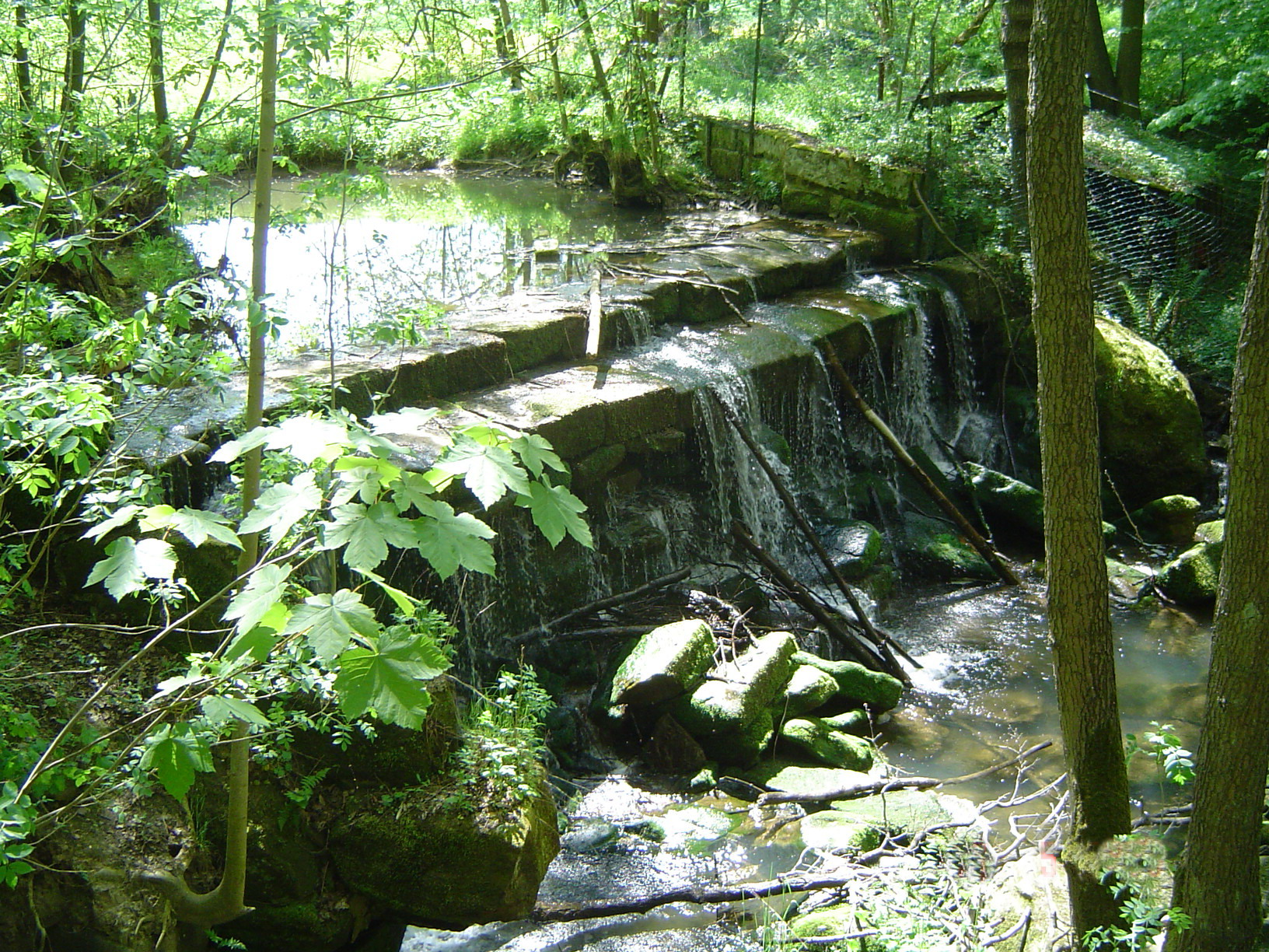 Der Mistel in Mistelbach (Oberfranken), Wasserfall.